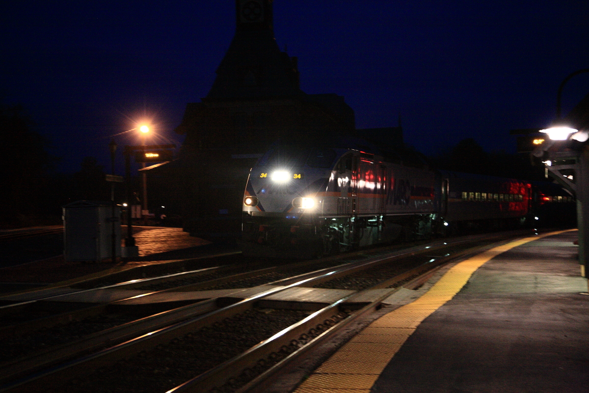 布朗斯威克線的馬里蘭區域通勤鐵路列車，巨岩點車站